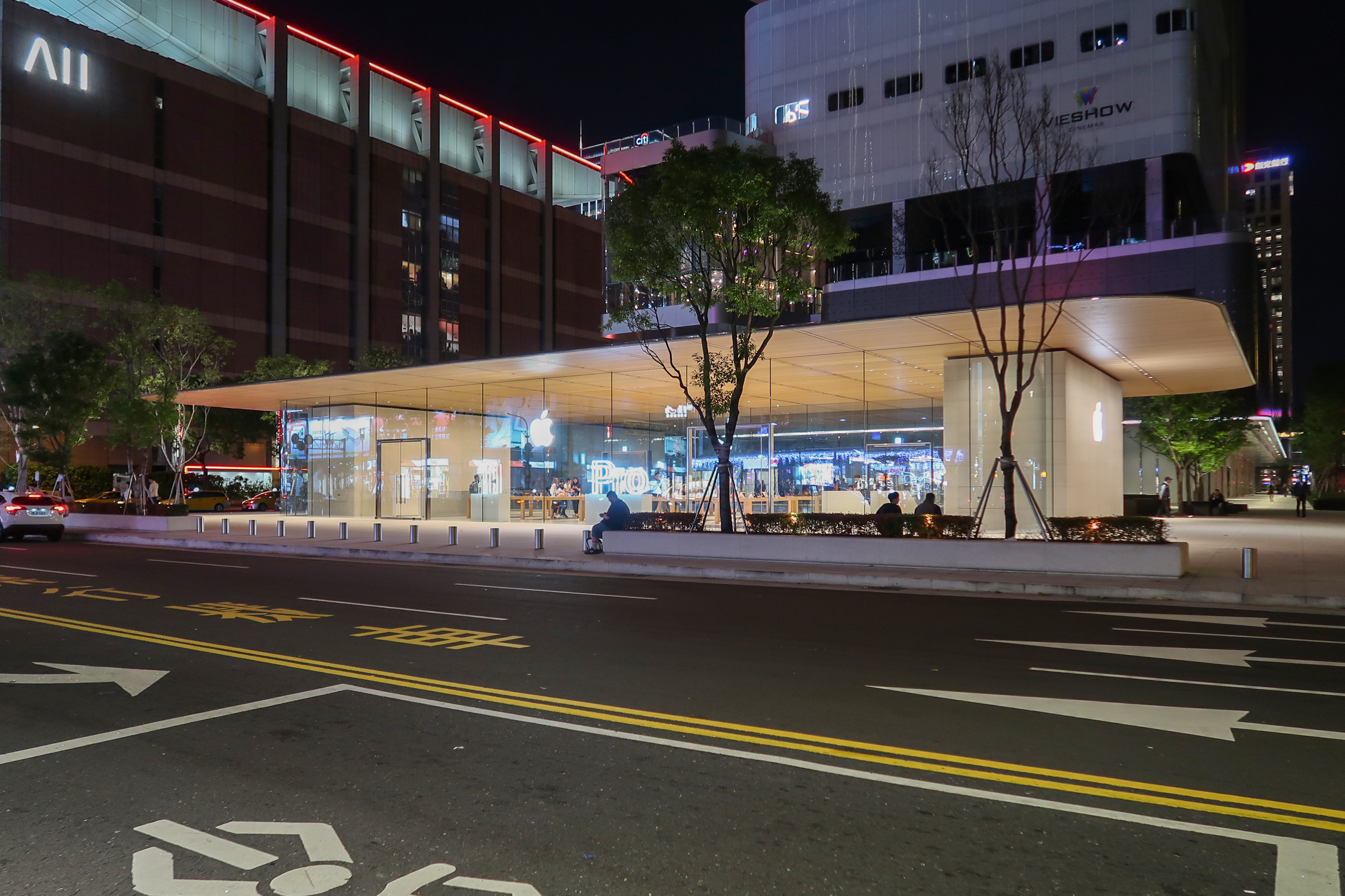 Apple Taipei Xinyi A13